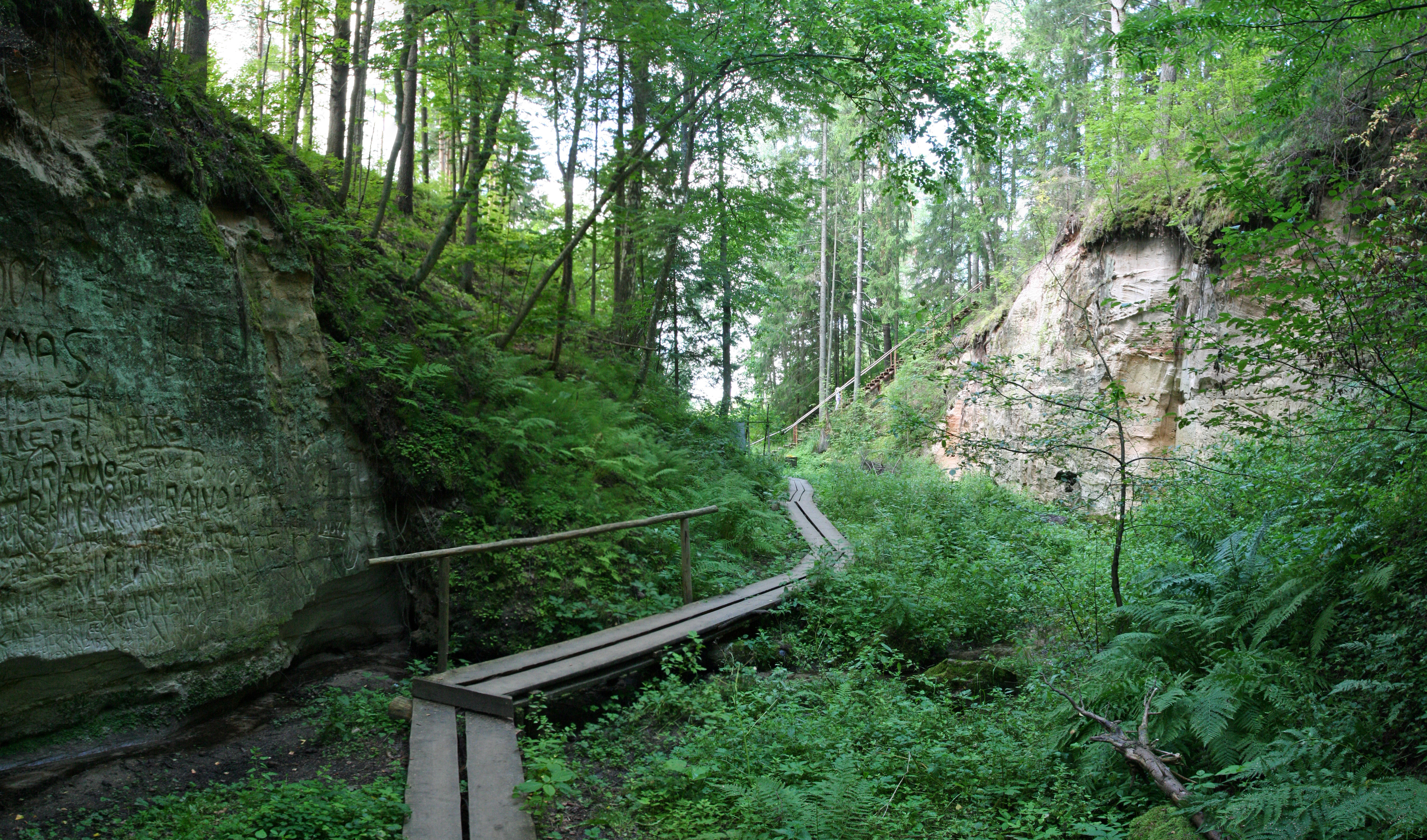 Hinni kanjon